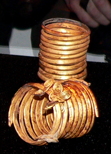 verzierte Ringe aus dem Goldhort von Gessel, präsentiert bei Pressekonferenz, Goldhort von Gessel, fotografiert im Niedersächsischen Landesamt für Denkmalpflege